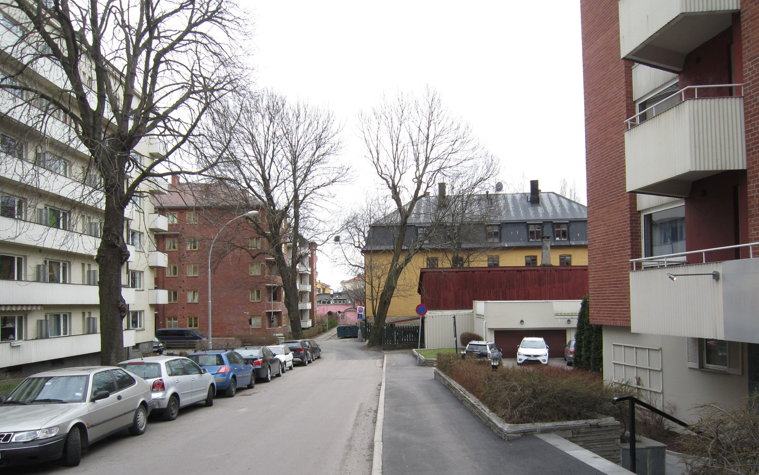 Ulfstens gate på Hegdehaugen i Oslo